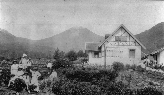 Foto. De theeonderneming Rarahan boven Sindanglaja, West-Java